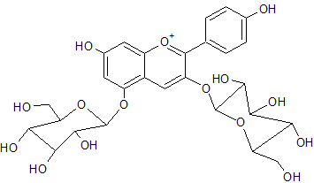 pelargonidin 3,5-diglucoside